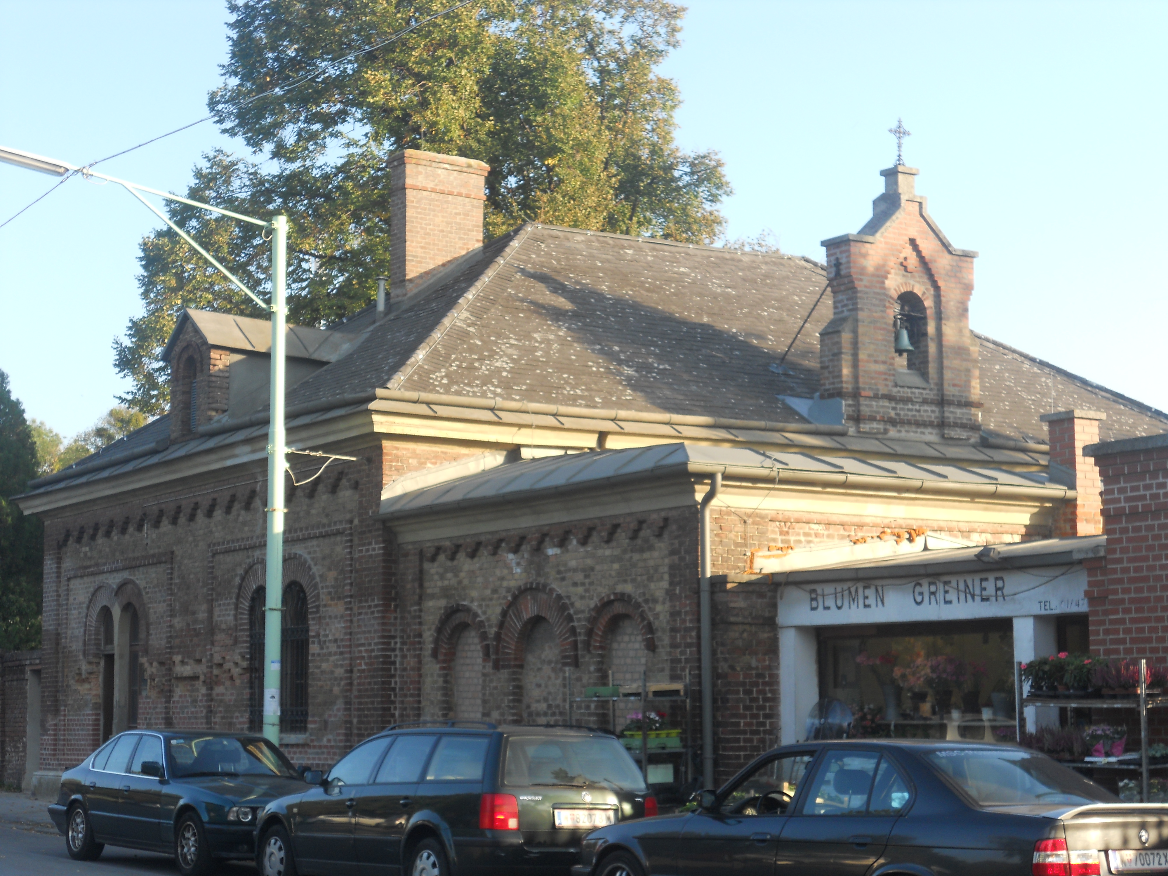 Friedhofsgebäude des Döblinger Friedhofs